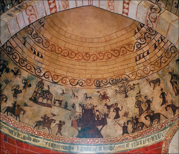 Alaitzako margolanak